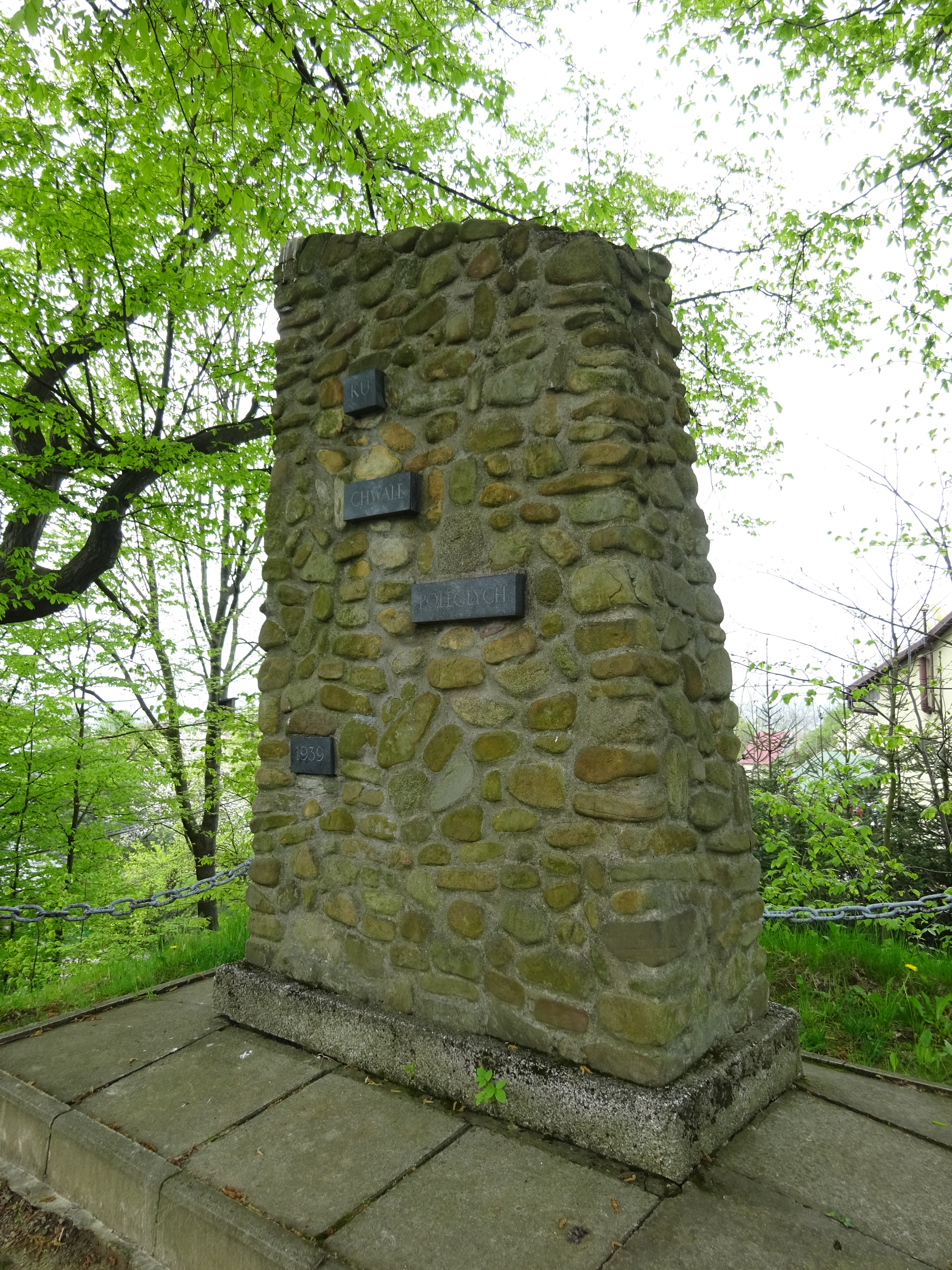 Pomnik ku chwale poległych na II wojnie światowej na Kopcu w Zręczycach. 2016